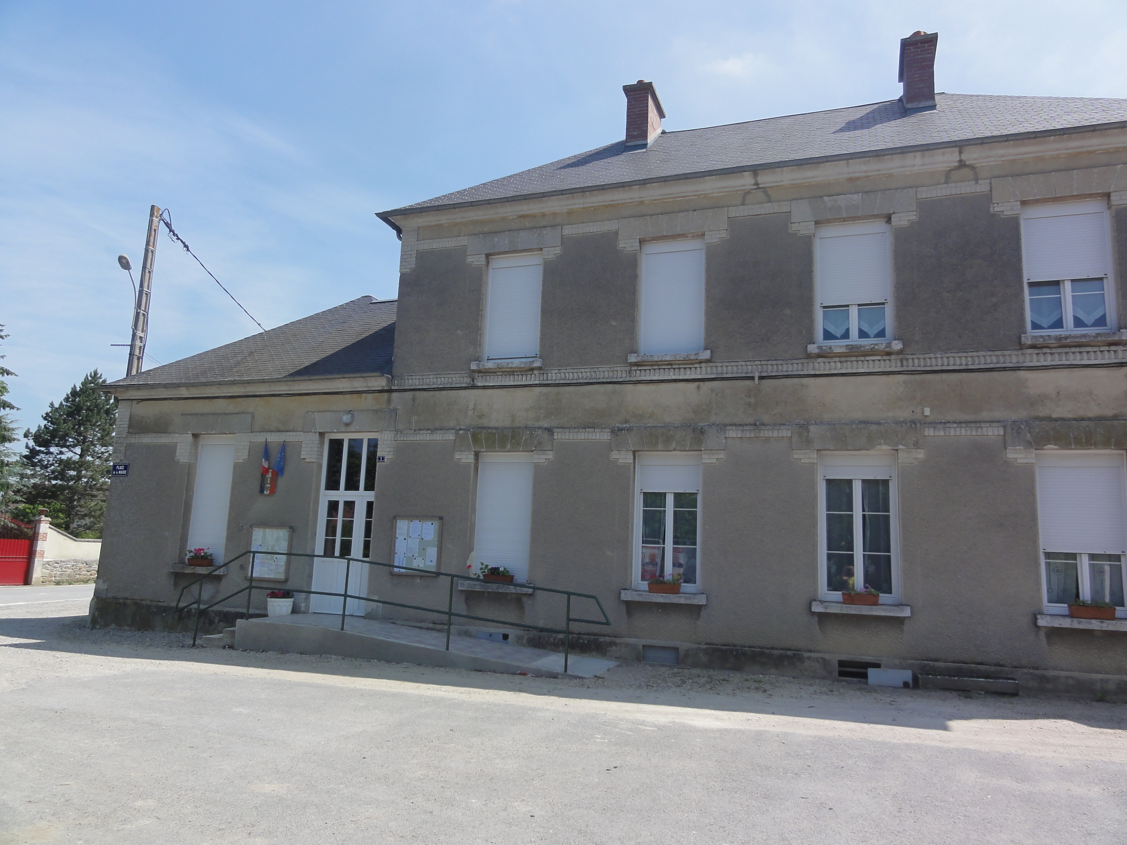 Chaudardes (Aisne) Mairie